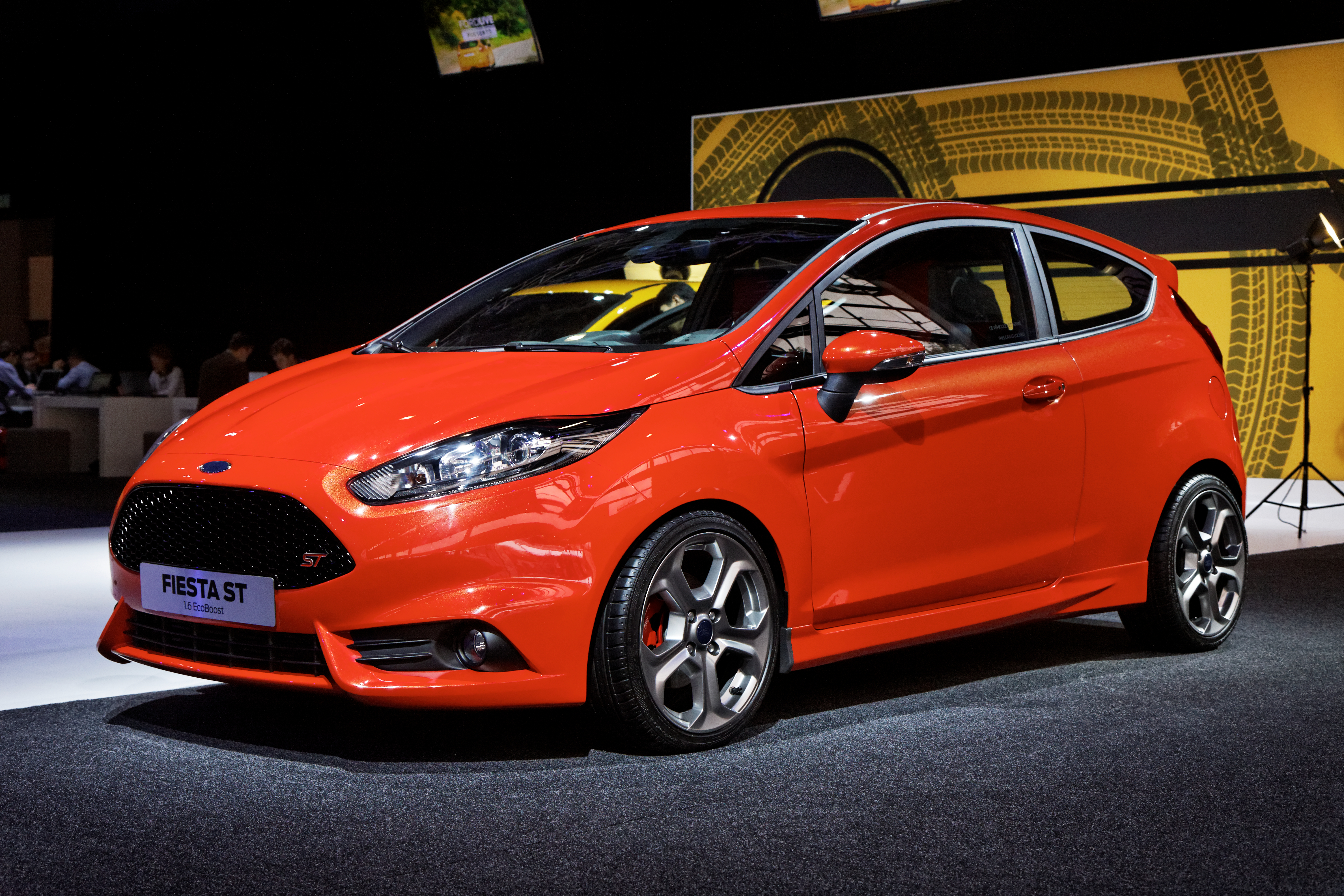 Une Ford Fiesta présentée lors du Mondial de l'Automobile de Paris 2012.